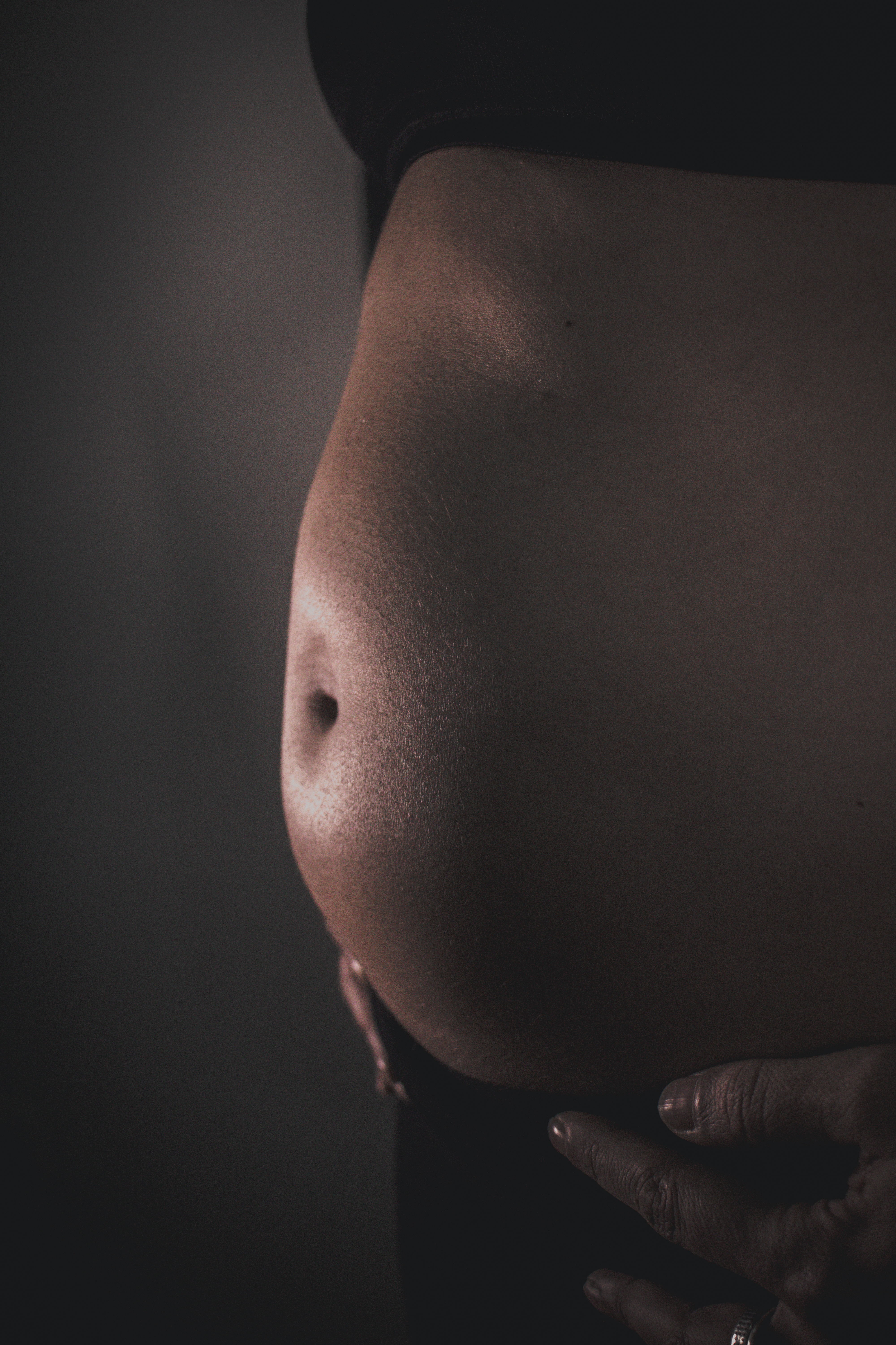 Hiru hilabetez haurdun daramatzan hogeitahemeretzi urteko emakume baten sabelaren argazkia da. Gertutik aterata.